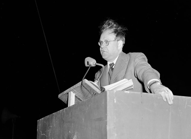 Valduell i Vasaparken. Porträtt av statsminister Tage Erlander (s), under duell mot oppositionsledaren Bertil Ohlin (fp)